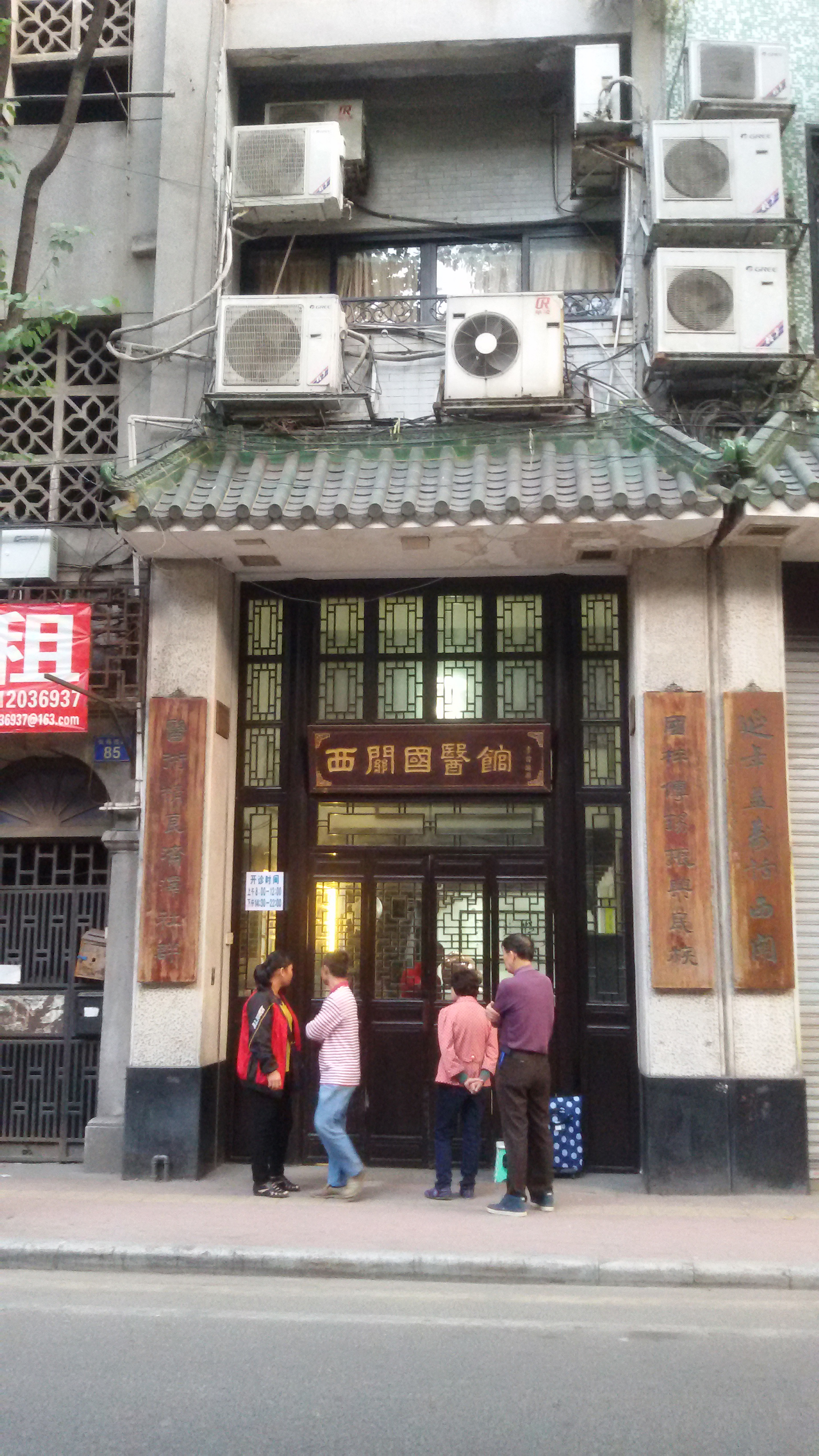 粵語: 荔湾区中医医院 - 西關國醫館分院